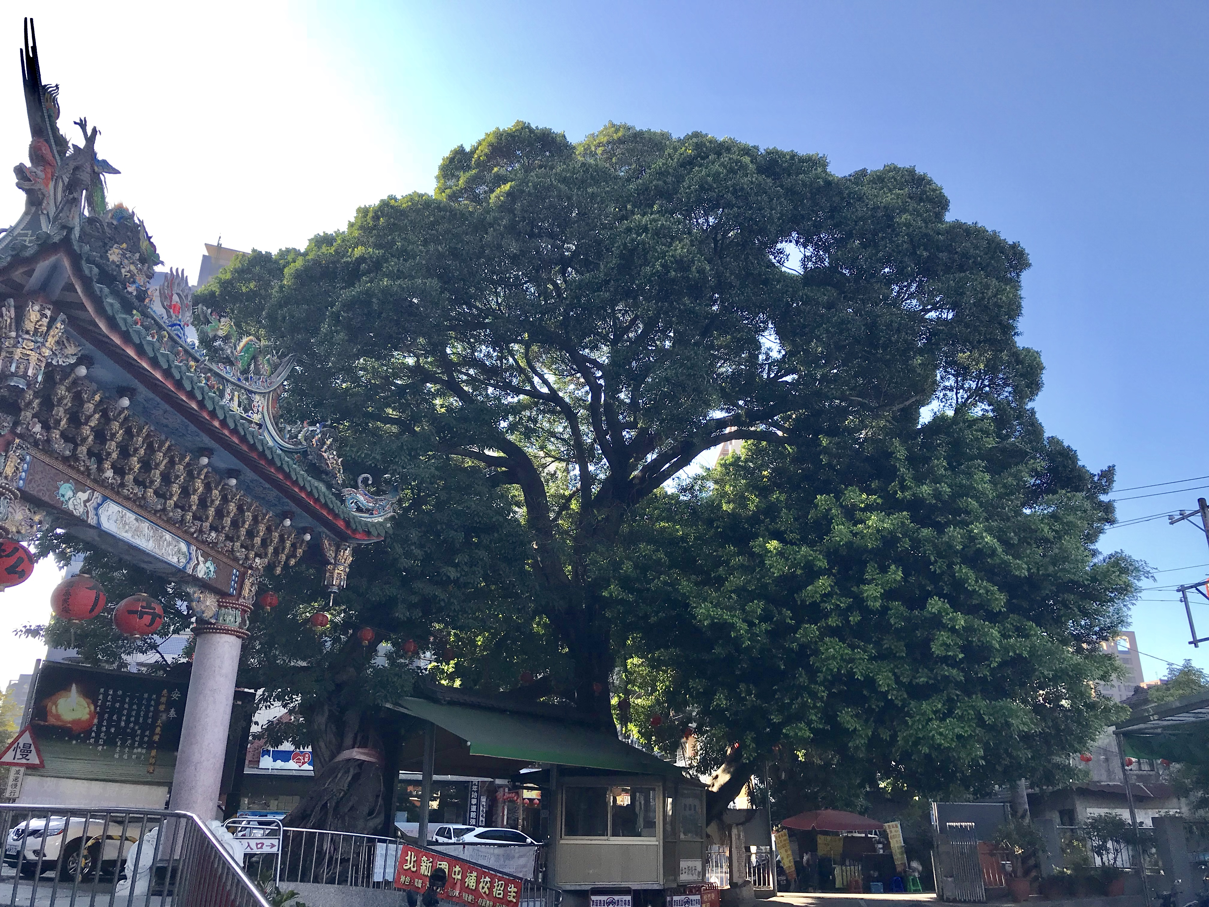 中文（台灣）: 松竹寺榕樹